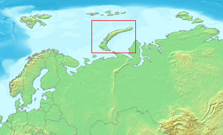 Kolgujew